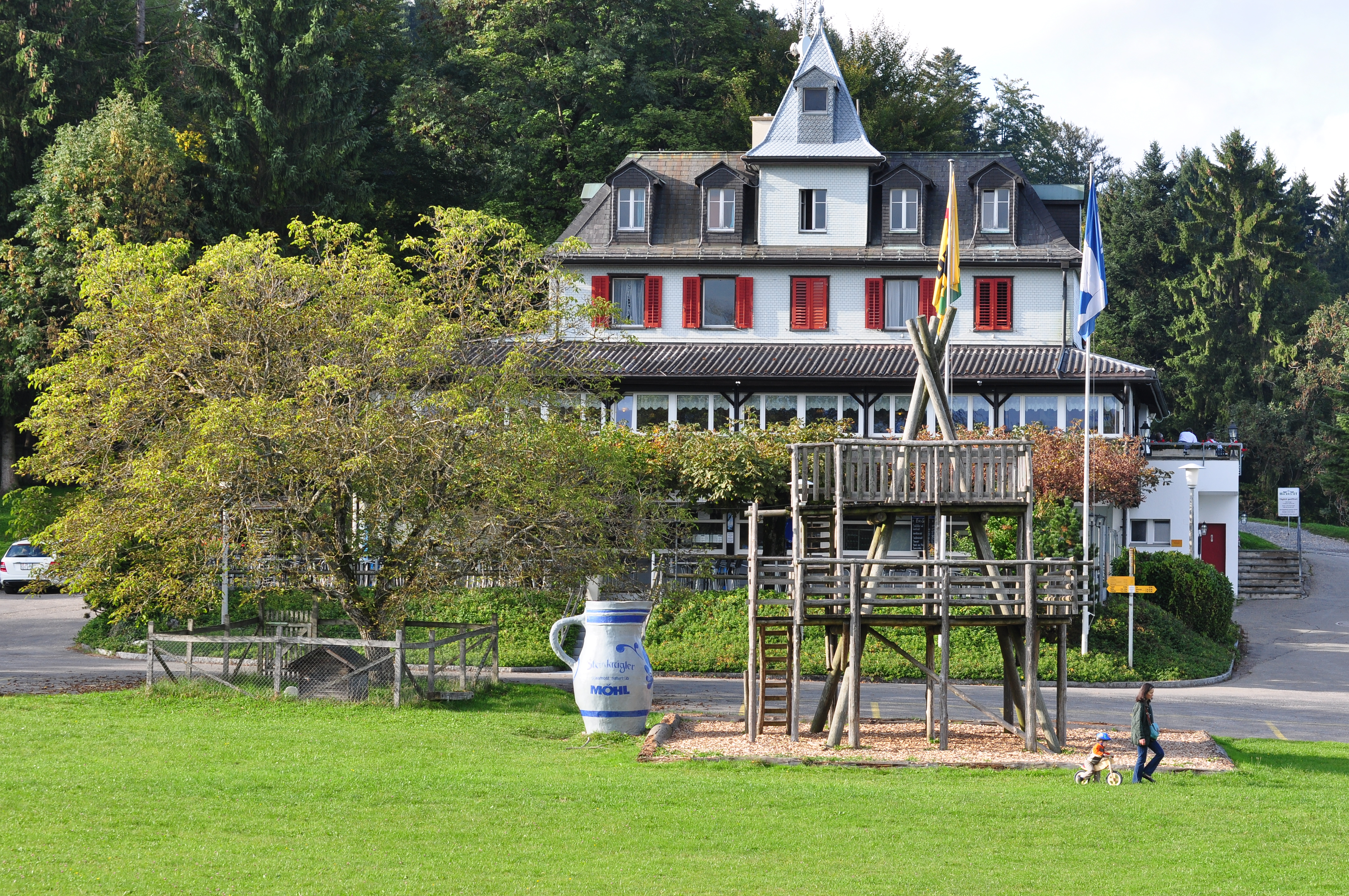 Pfannenstiel Hochwacht (Switzerland)